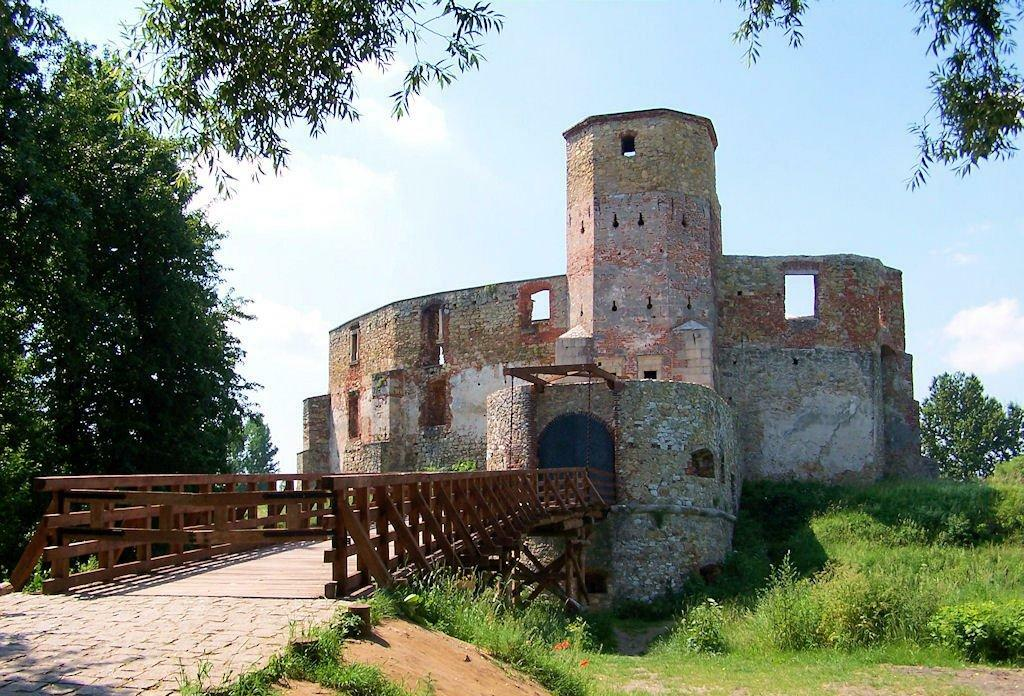 Zamek biskupi w Siewierzu - wejście po renowacji